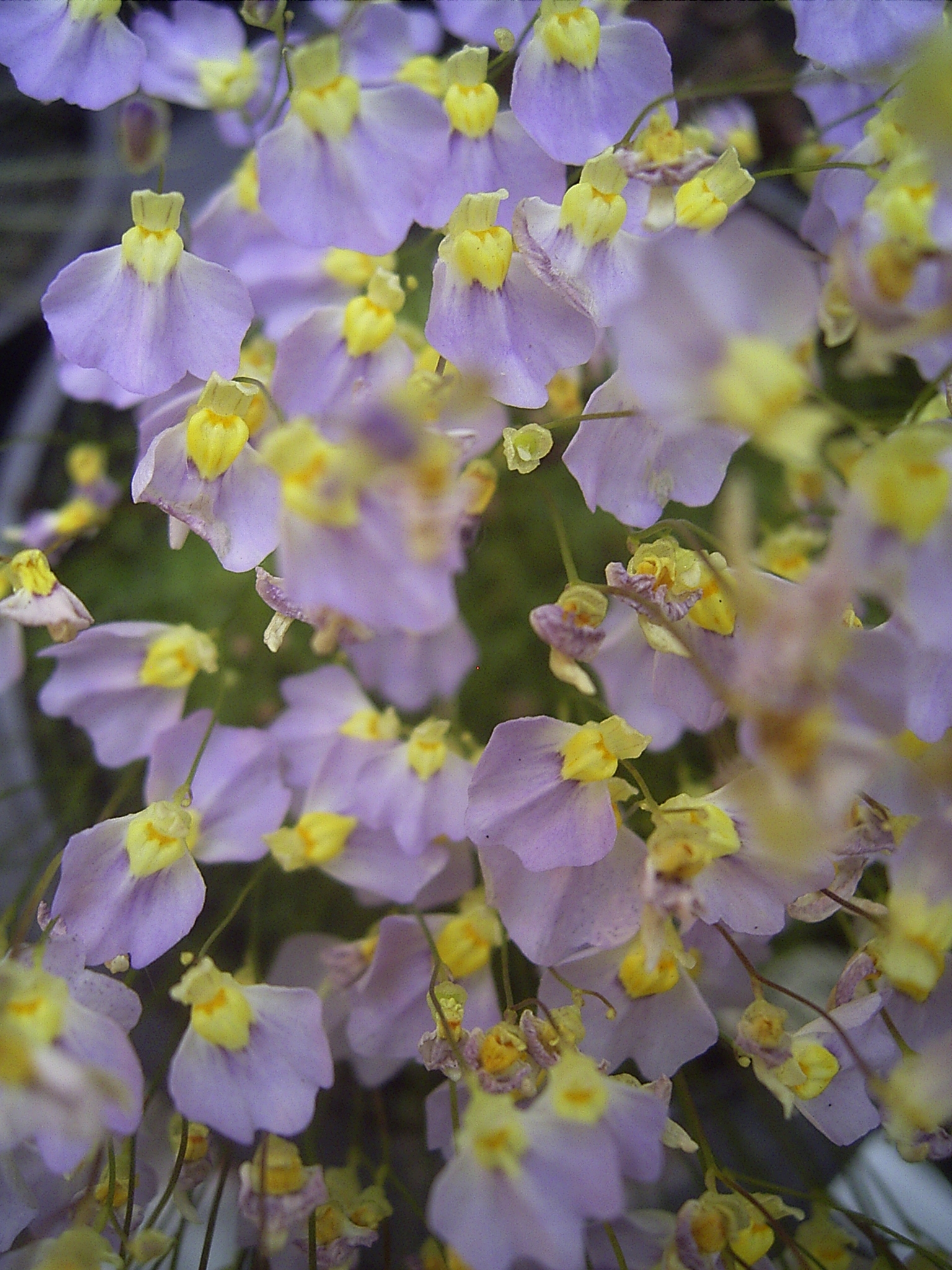 Utricularia bisquamata flora